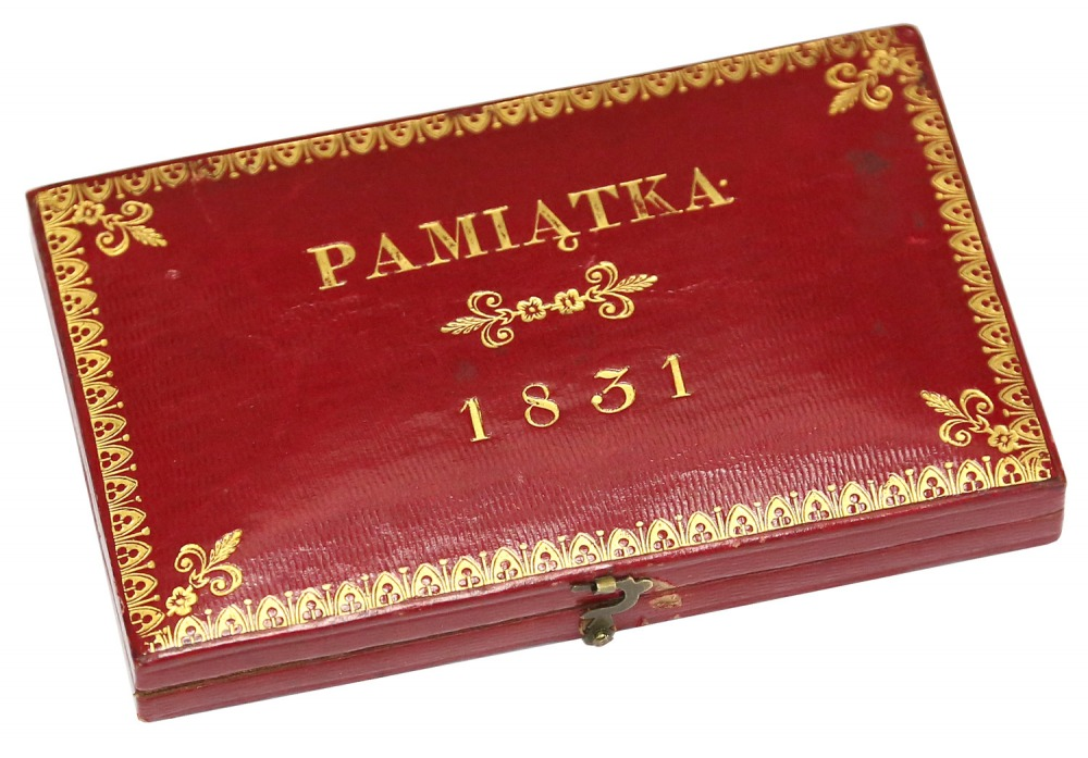 Pudełko na monety powstania listopadowego jedna z wersji w kolorze czerwonym